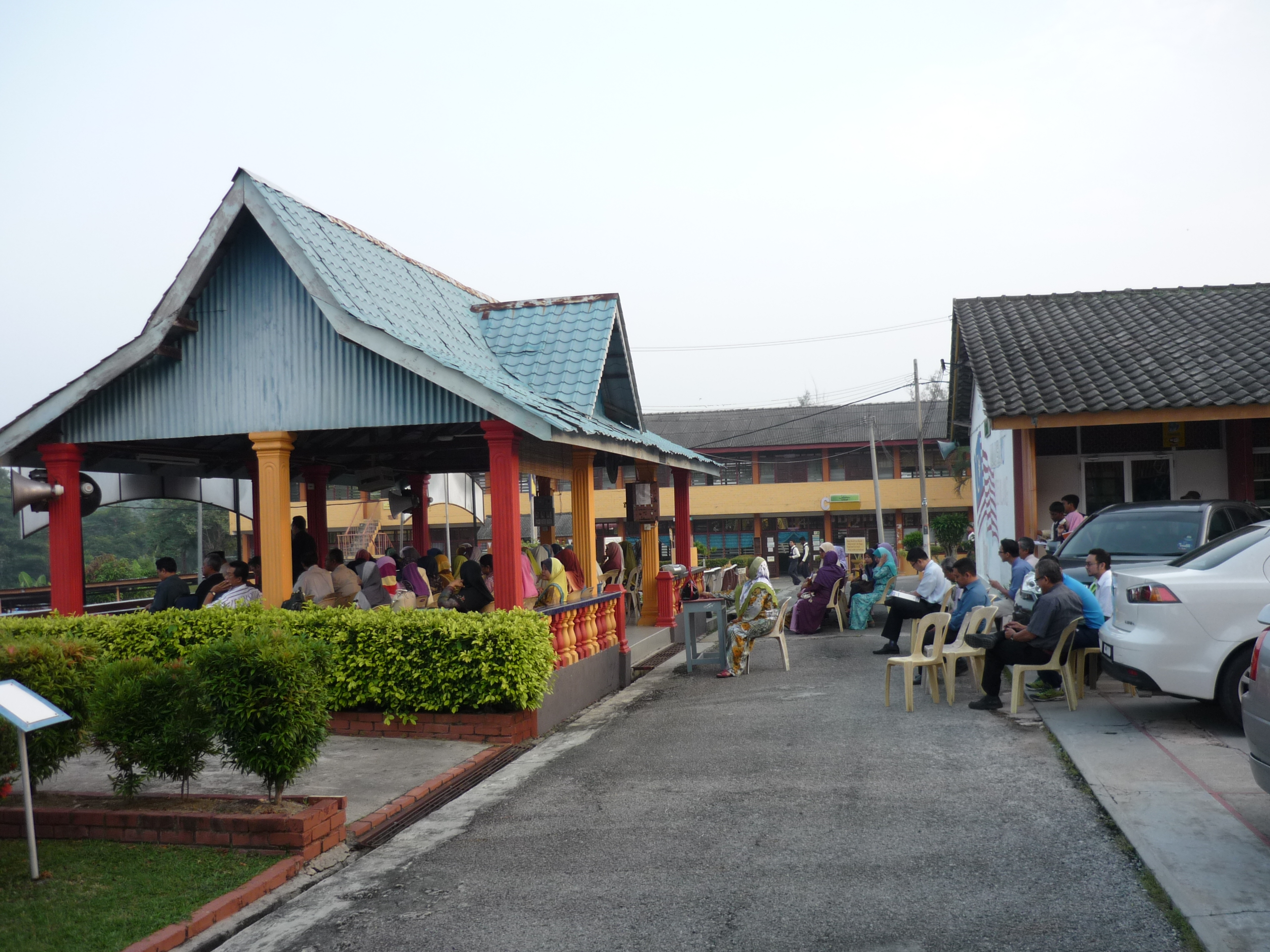 Laluan ke Bilik Guru